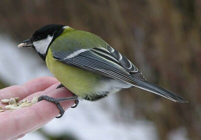 Sýkora koňadra (Parus major) Czech Republic